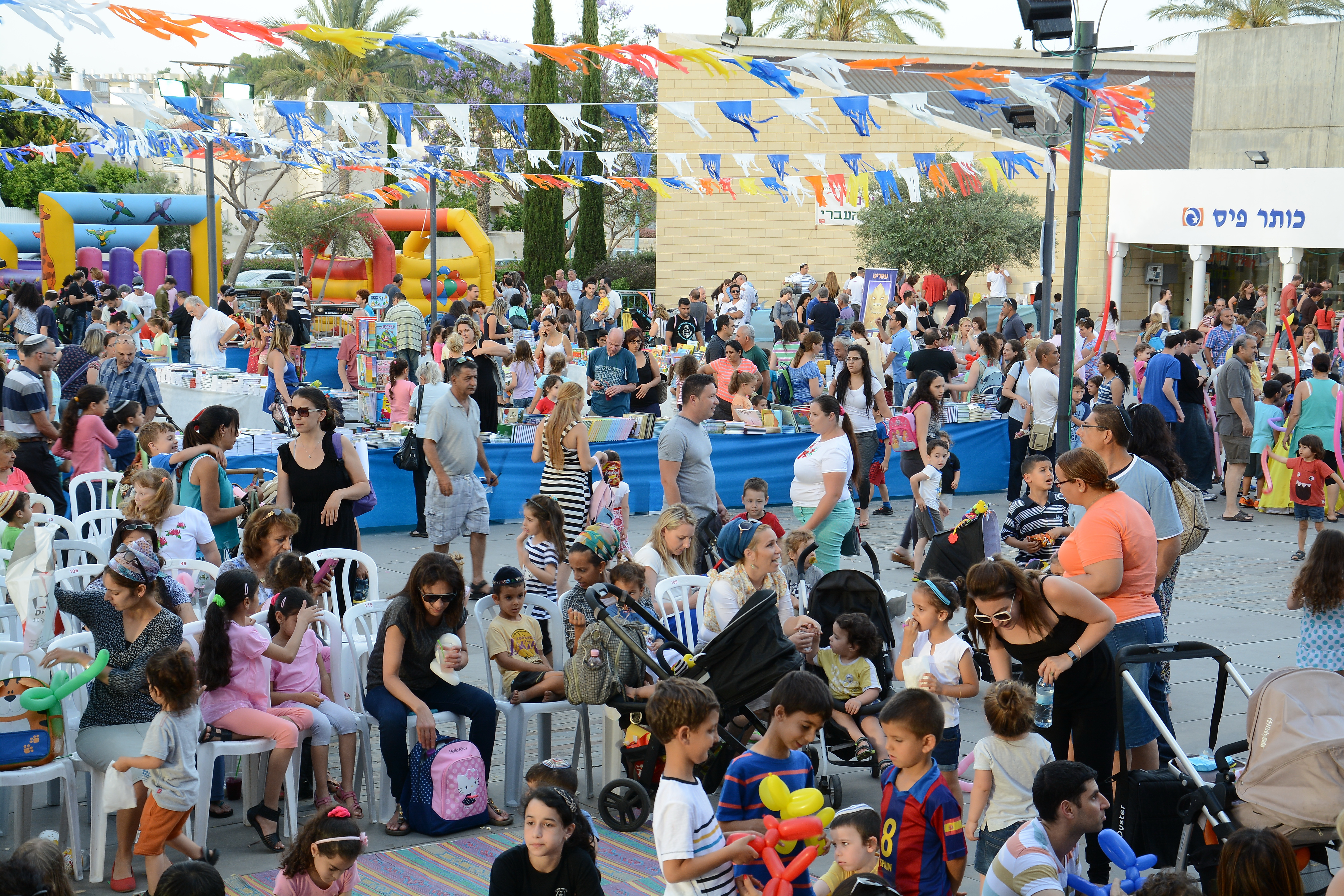 חגיגת שבוע הספר העברי, יבנה 2015